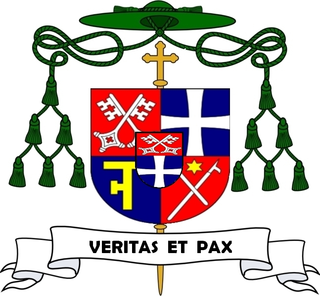 Wappen des Bischofs von Berlin v.21.12.1933-01.03.1935 Nikolaus Bares